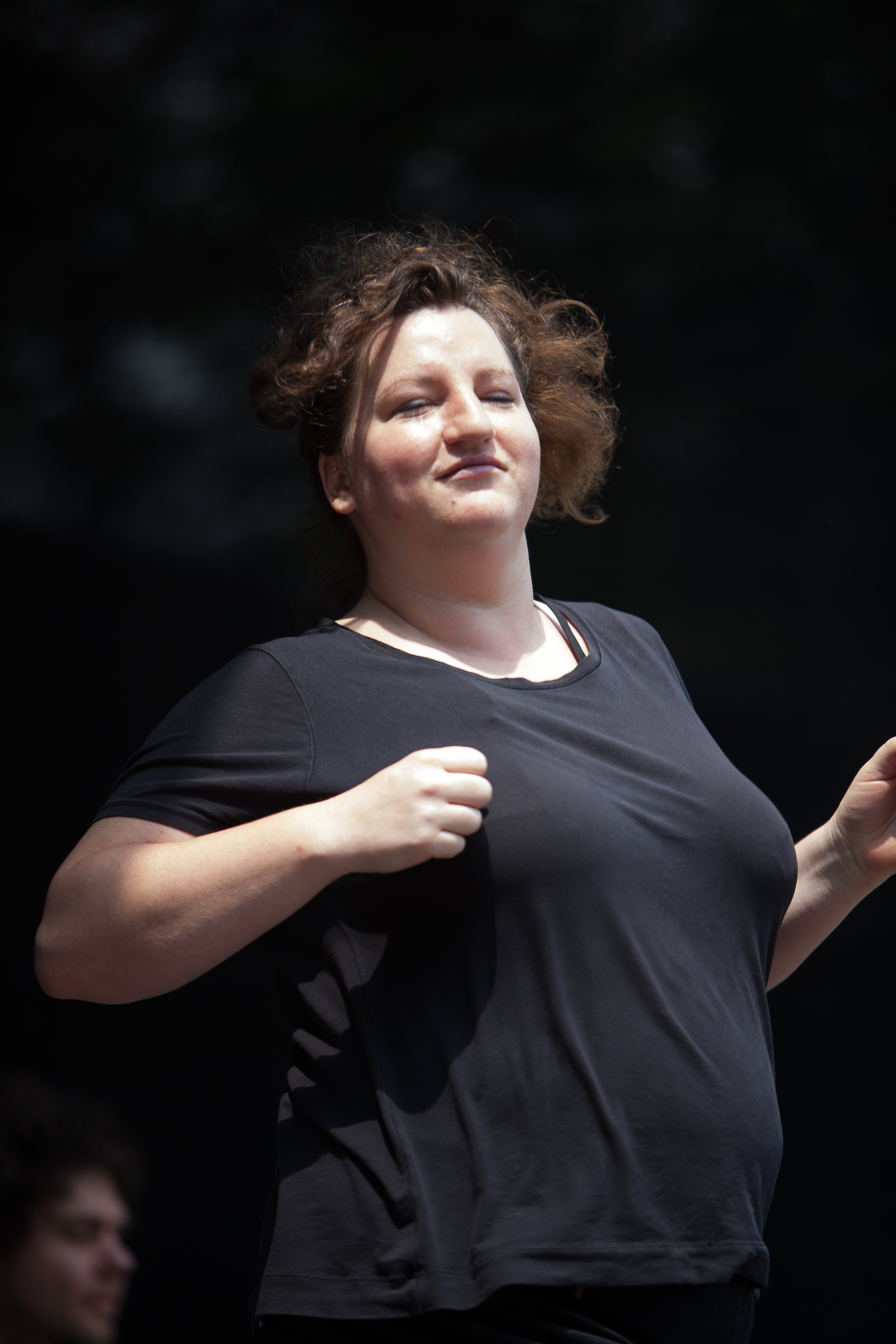 Die Sängerin Annamateur auf dem TFF Rudolstadt 2013